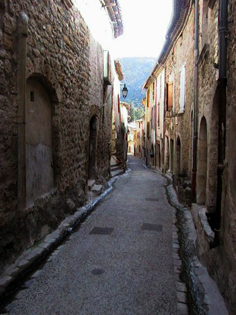 St Guilhem le Desert, Herault, France